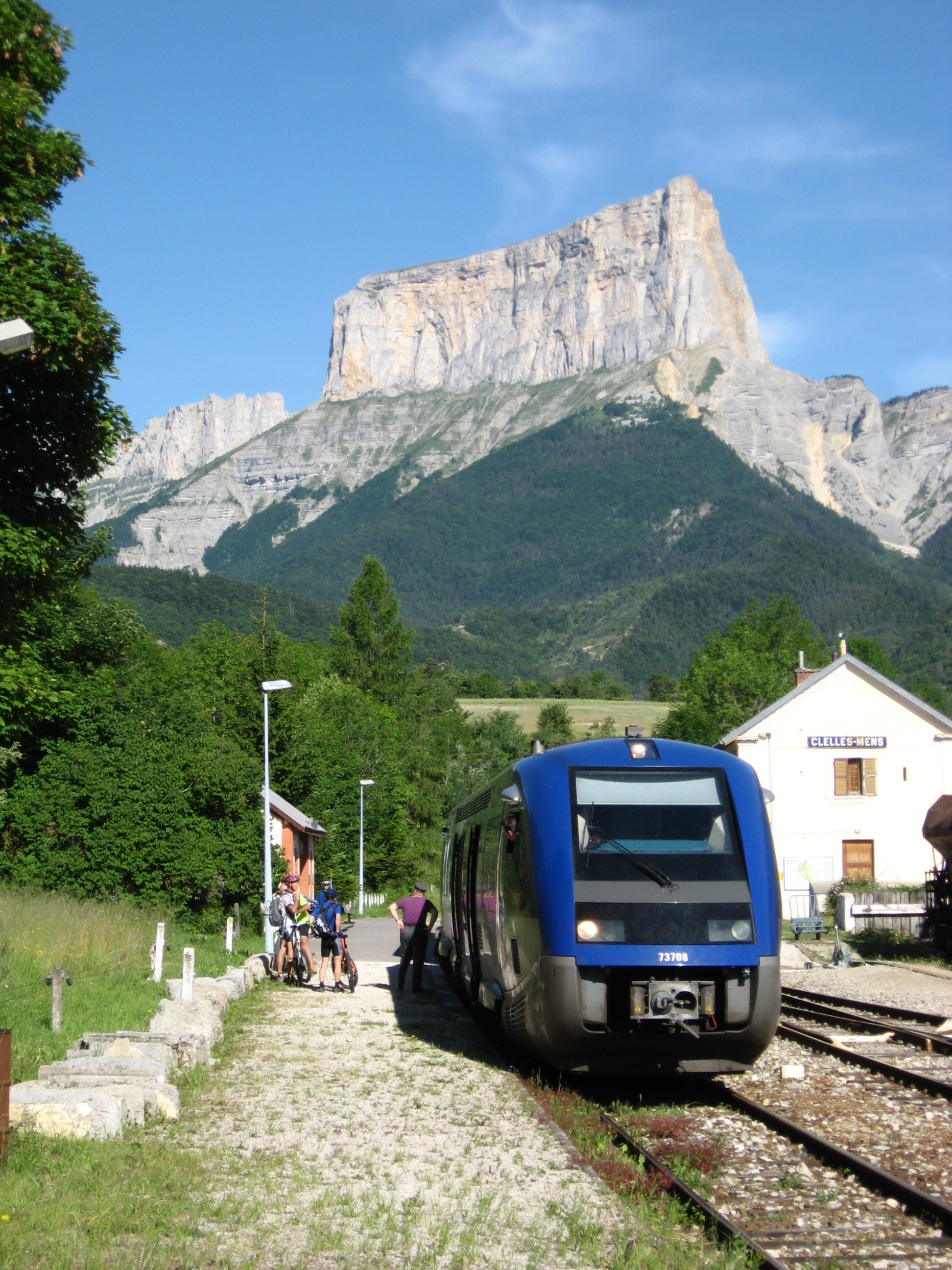 Autorail X 73500 en gare de Clelles-Mens (Isère, France). Mont Aiguille dans de fond.